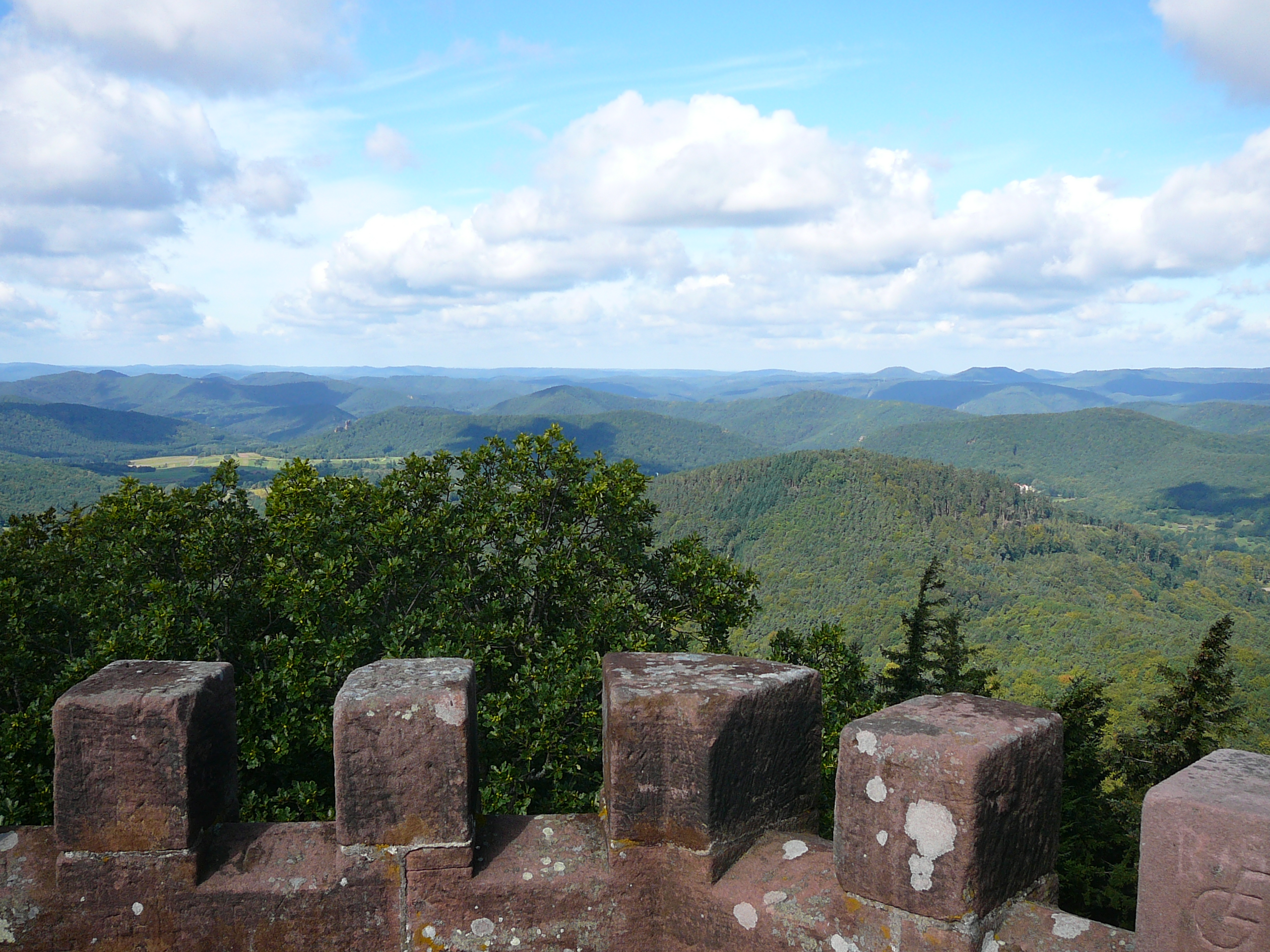 Blick vom Rehbergturm nach Westen